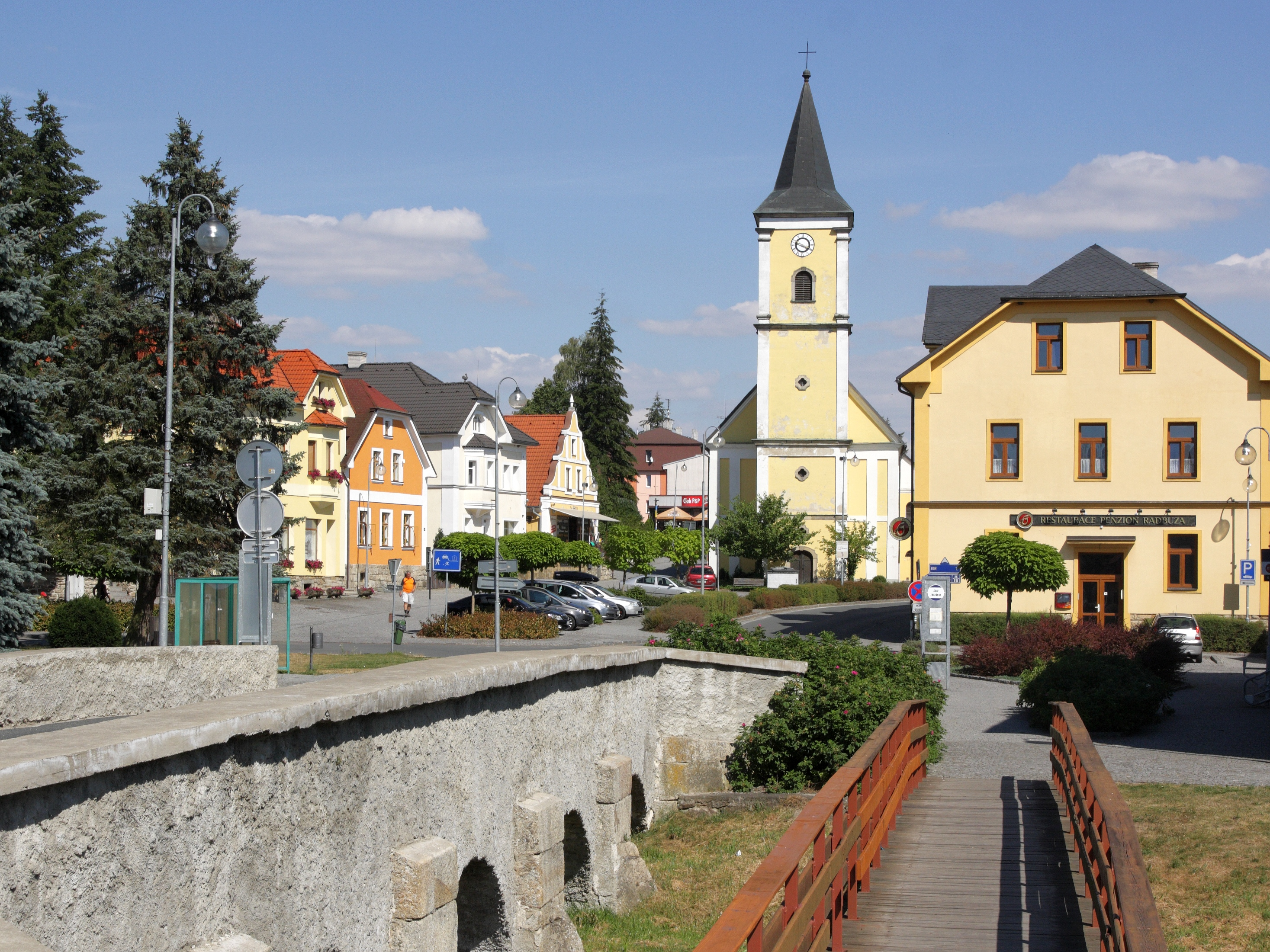 Bělá nad Radbuzou - most přes Bezděkovský potok a náměstí.